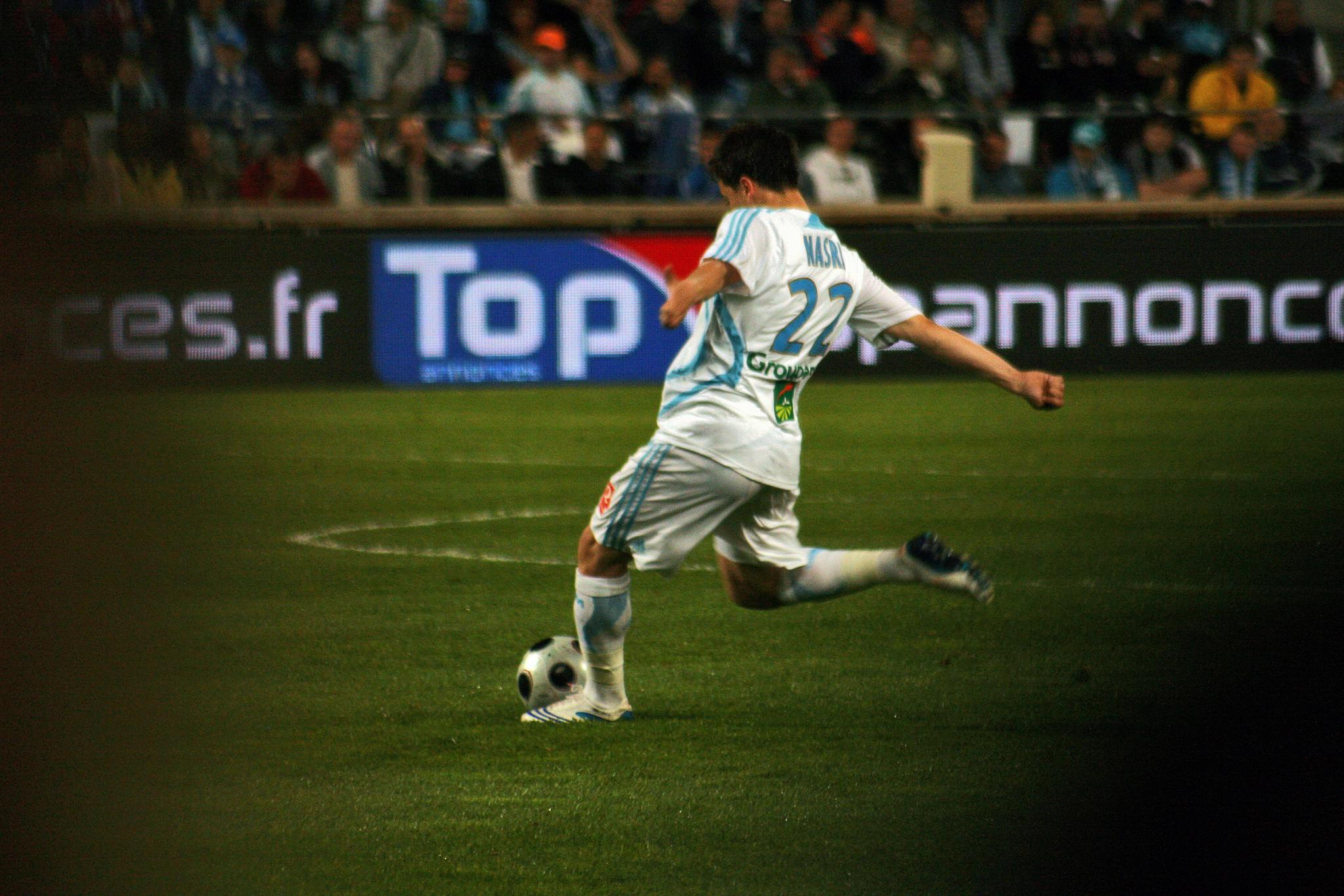 Olympique de Marseille - Girondins de Bordeaux Samir Nasri 2007-2008